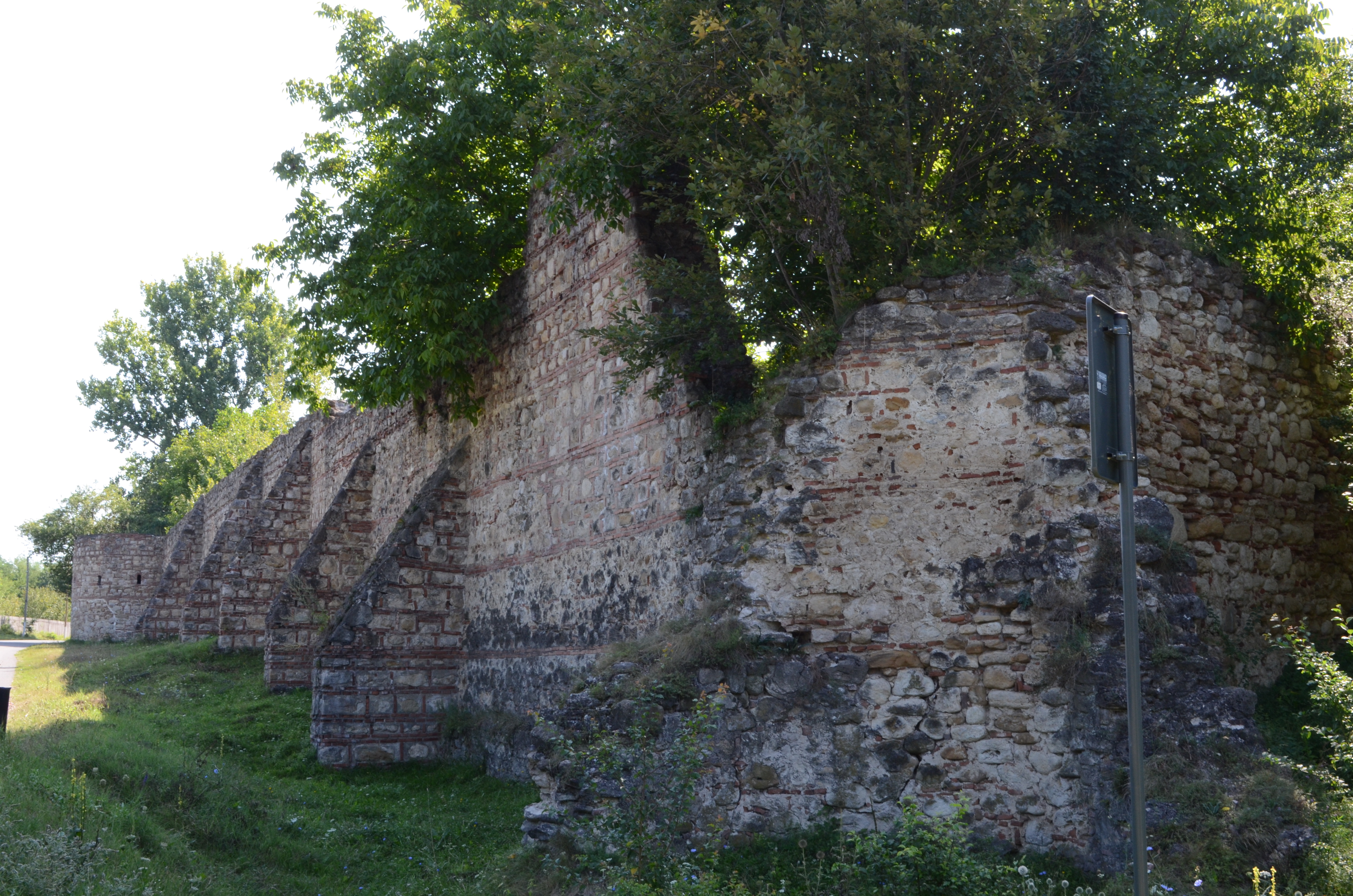 Zidurile fostei mănăstiri Bradu, comuna Tisău, județul Buzău 03